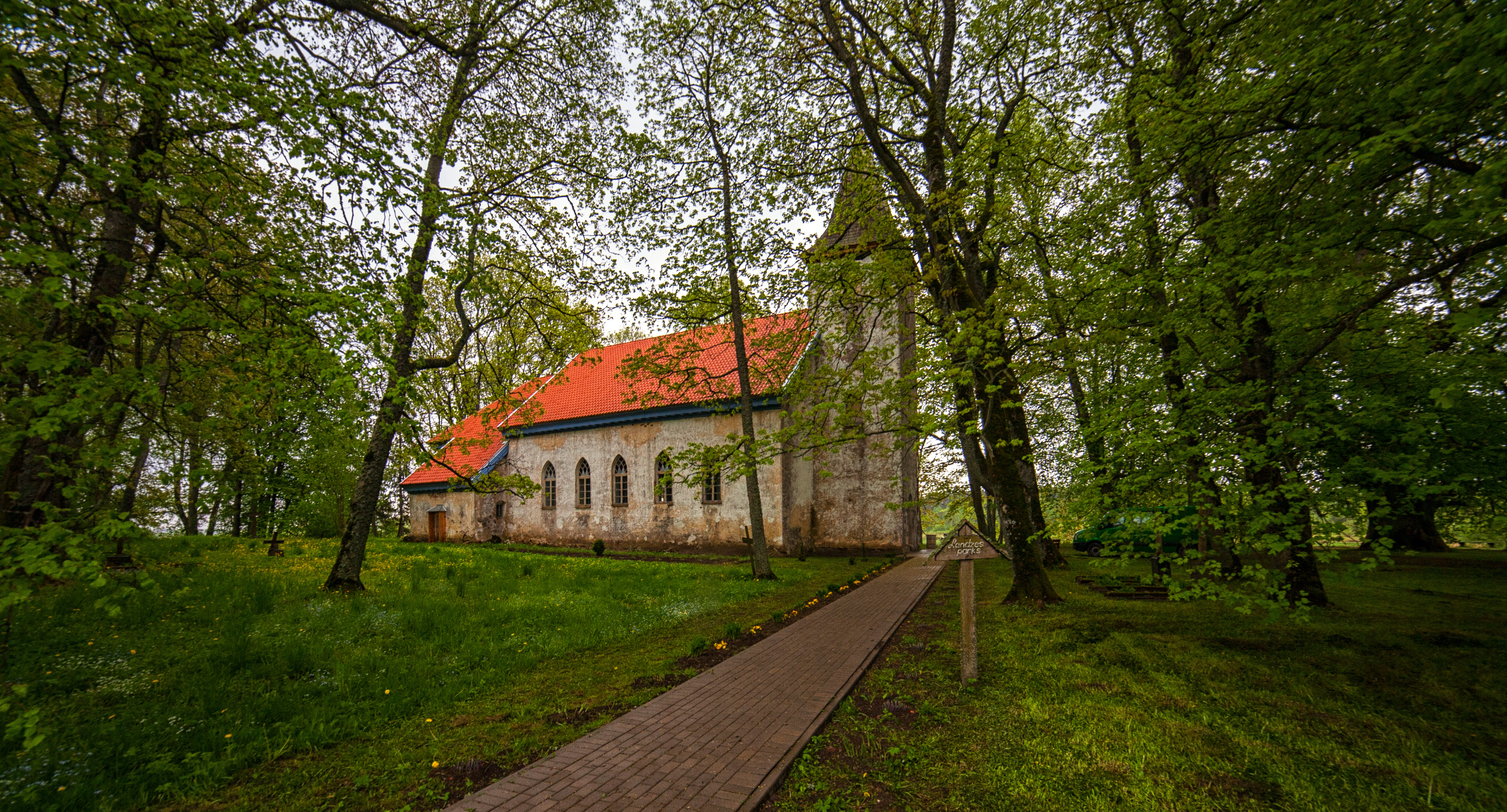 Landzes luterāņu baznīca, Piltenes pagasts